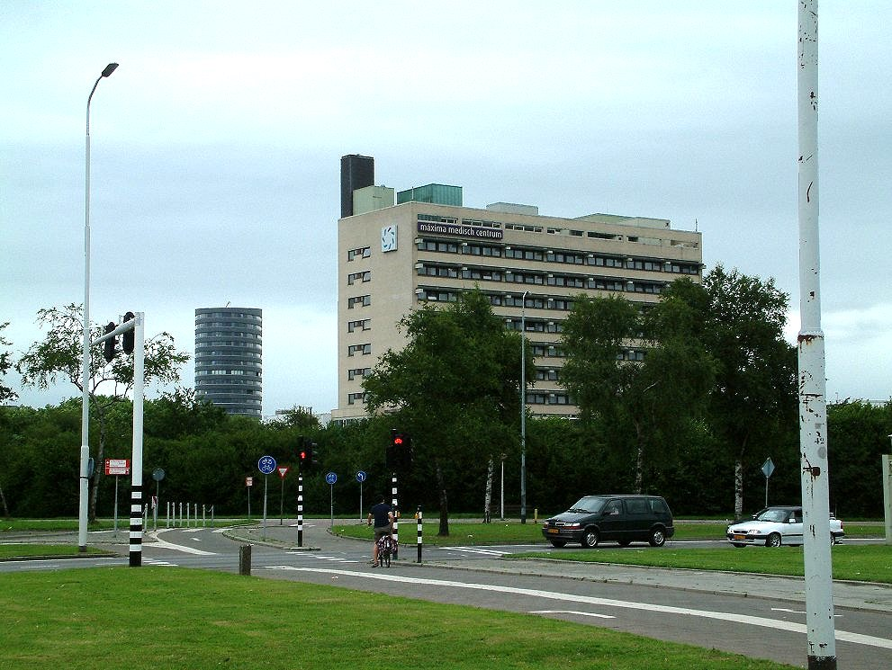 Woontoren de Ranken en Máxima Medisch Centrum in Eindhoven